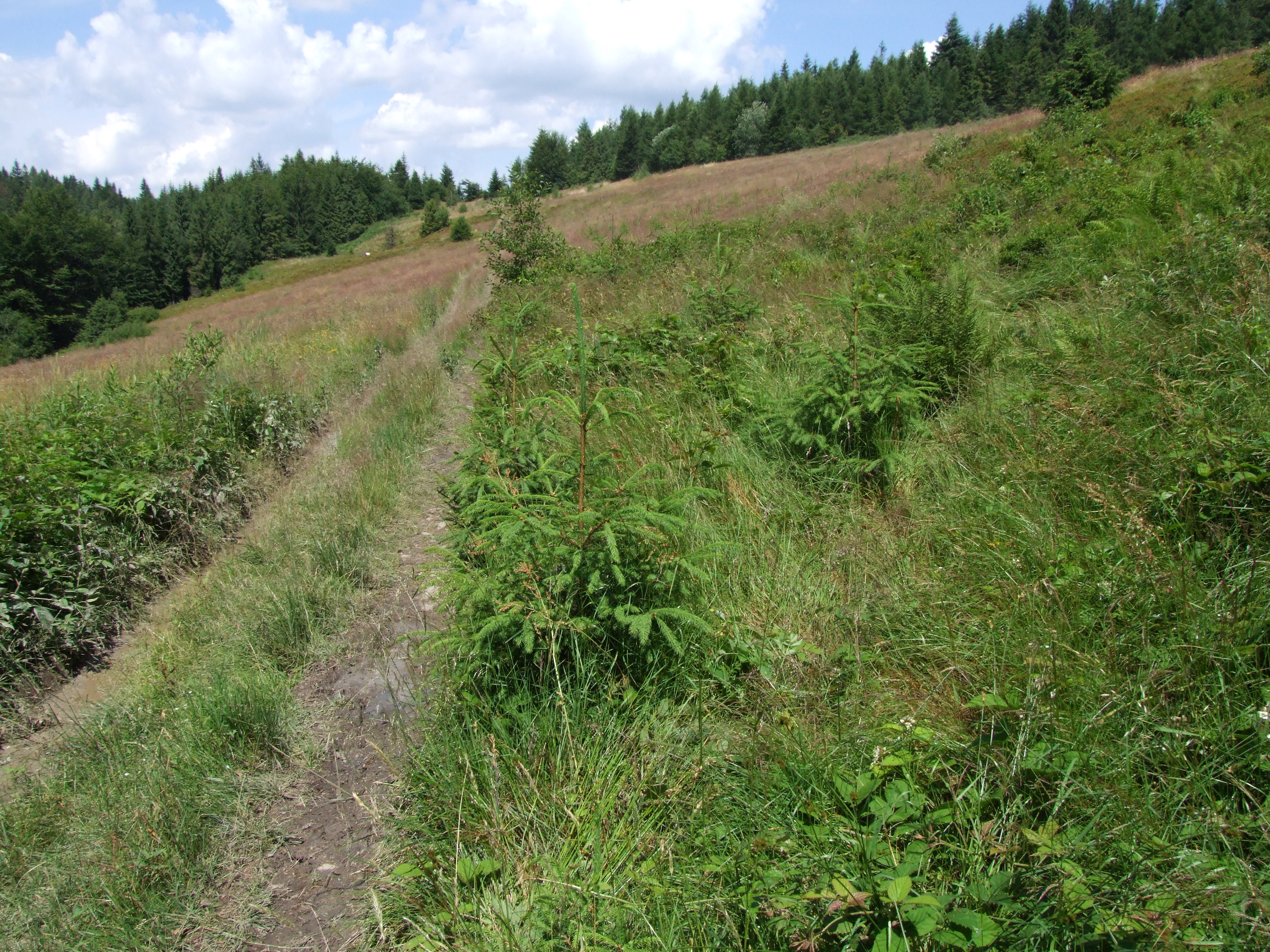 Polana Folwarczna w Beskidzie Wyspowym